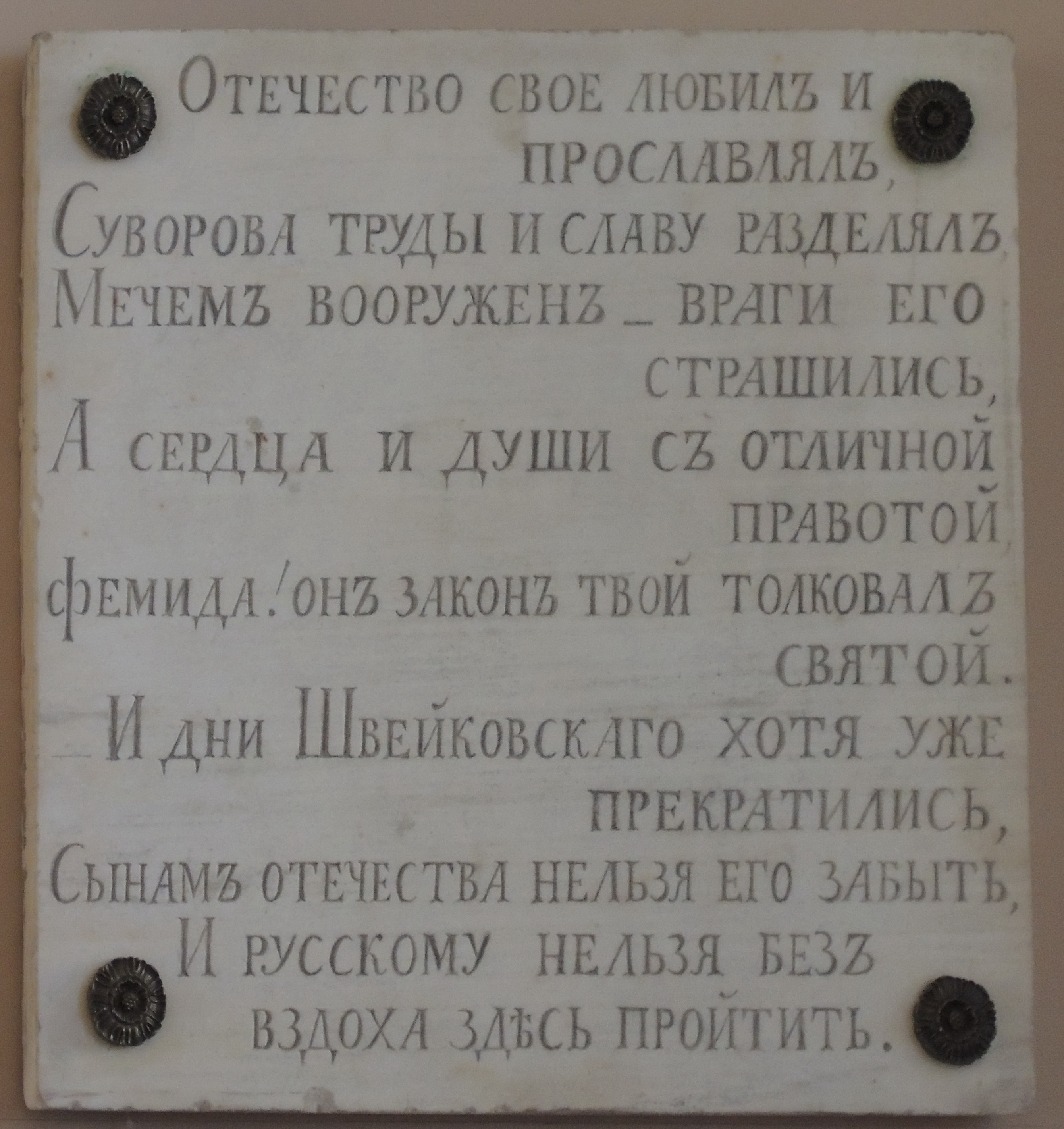 Благовещенская церковь Александро-Невской лавры. Повало-Швейковский, Яков Иванович (1750—1807). Генерал от инфантерии, участник Итальянского похода А. В. Суворова 1799 г. Плита со стихотворной эпитафией. Перенесена с памятника на Лазаревском кл. "Отечество свое любил и прославлял, Суворова труды и славу разделял Мечем вооружен - враги его страшились, А сердца и души с отичной правотой Фемида! он закон твой толковал святой. И дни Швейковскаго хотя уже прекратились, Сынам отечества нельзя его забыть, И русскому нельзя без вздоха здесь пройтить".